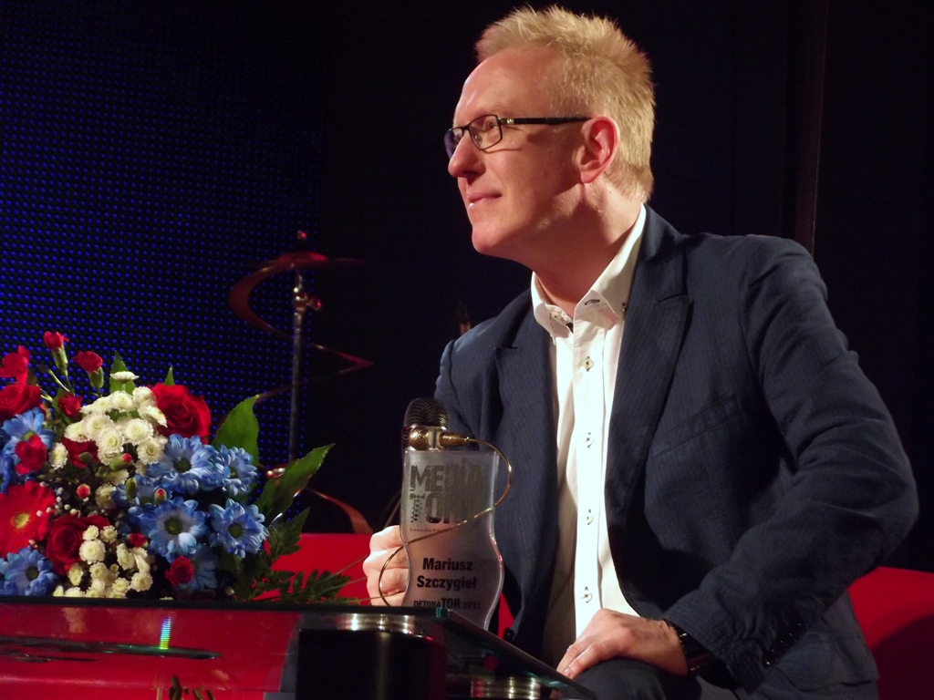 Zdjęcie zrobione podczas gali rozdania dziennikarskich nagród dziennikarskich MediaTory 2013 w Krakowie.